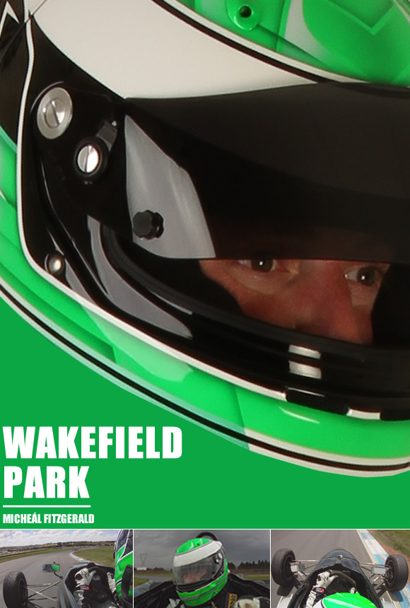 Micheal Fitzgerald Wakefield Park Cork Racing Michael Fitzgerald Australia Formula Ford